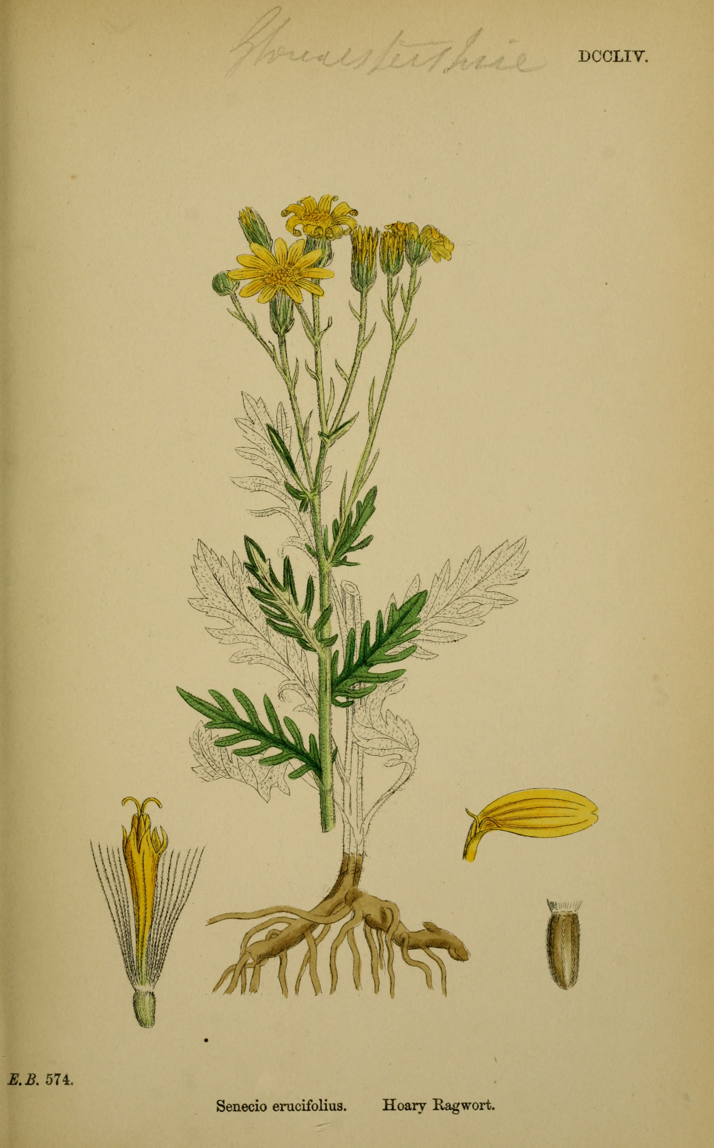 Legende: Oberer und unterer teil der Pflanze. Röhrenblüte. Strahlenblüte, Fruchtknoten entfernt. Frucht, Pappus entfernt.